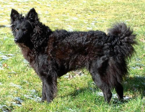 Categorie:Afbeelding hond